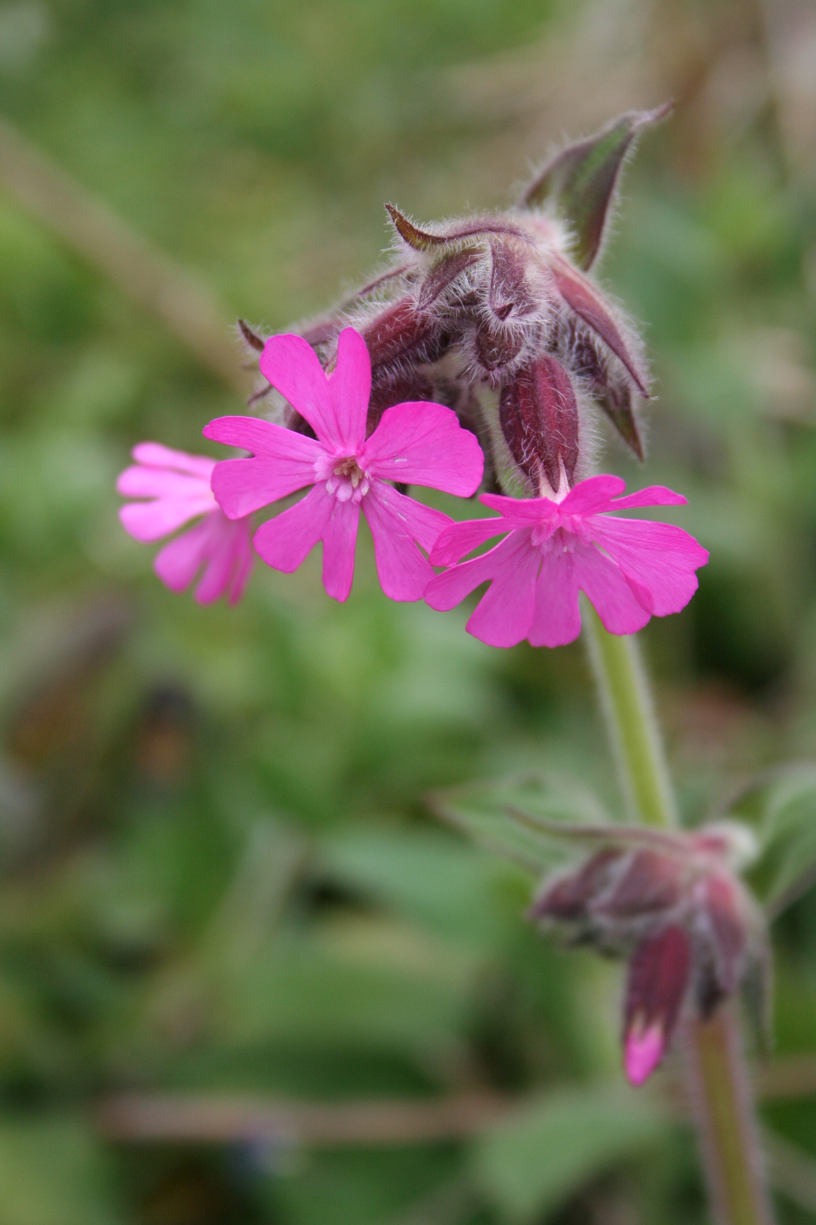 Silene dioica (Red Campion) near Crozon, France.